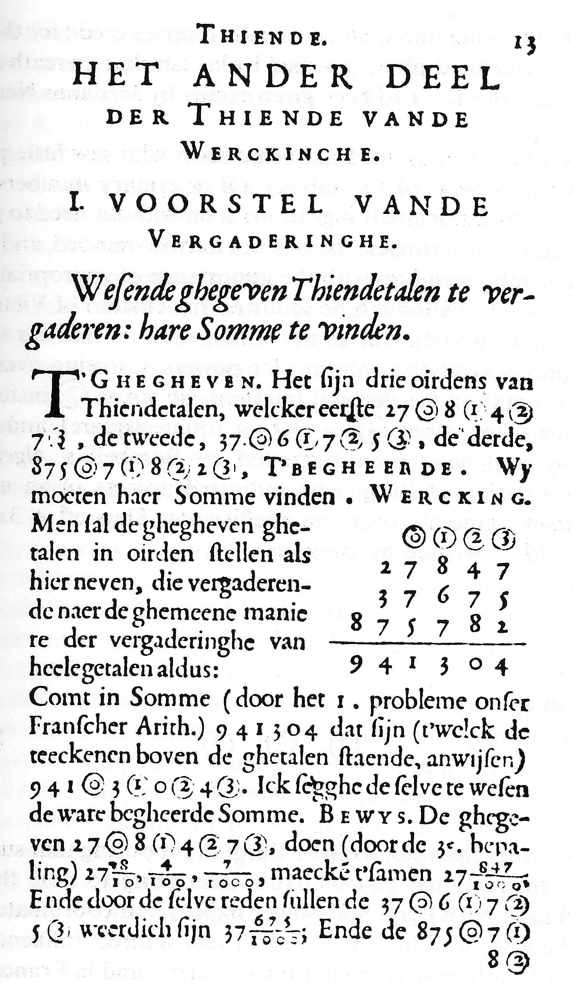 Stevin, Dutch scientist, book De Thiende, page 13